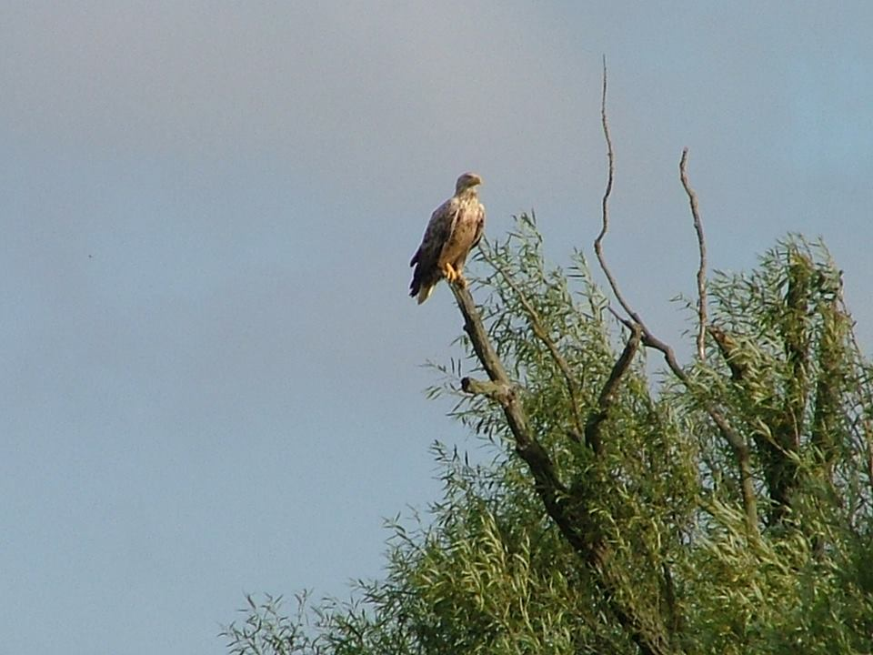 Buschmähns Welt